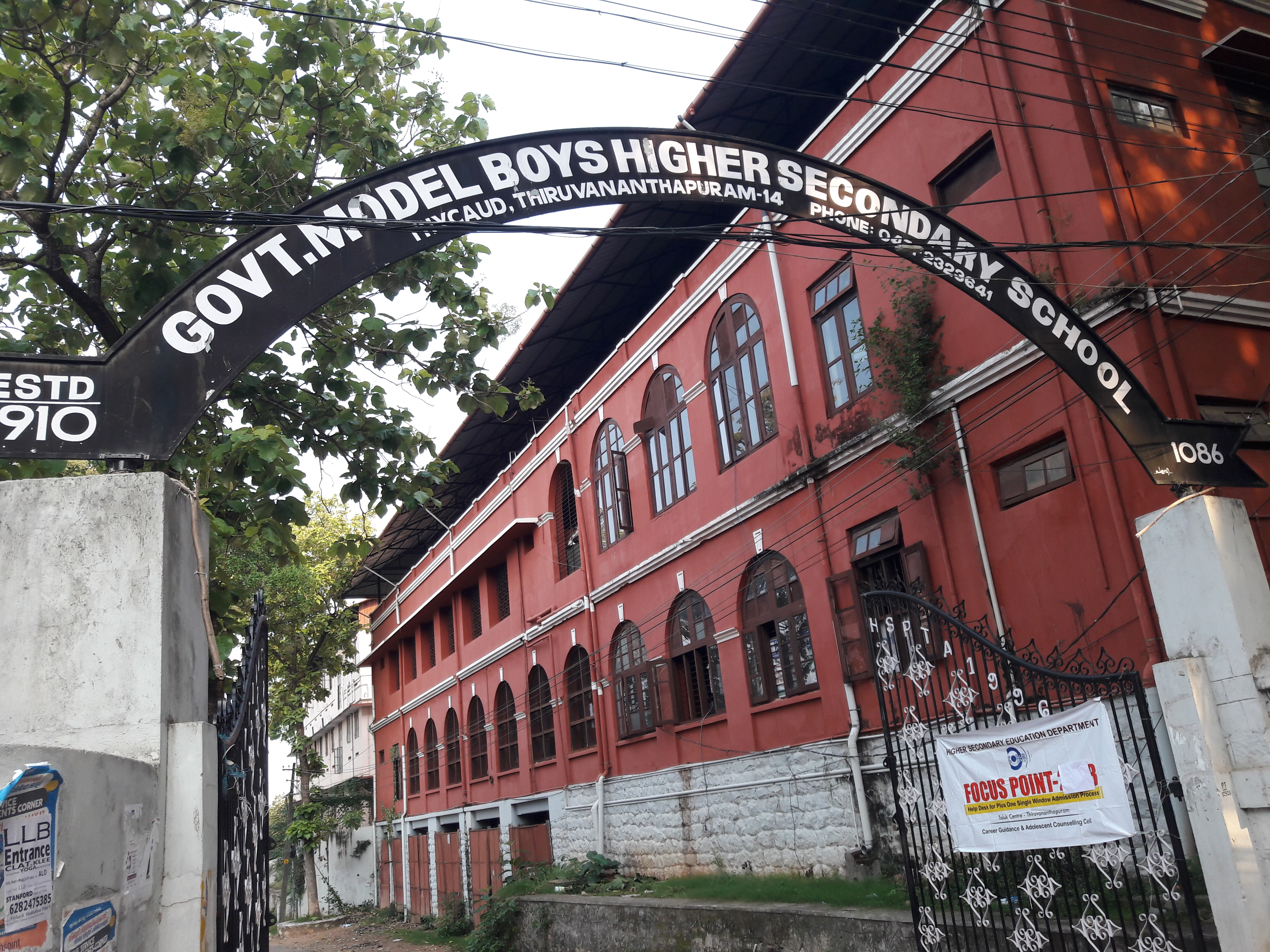 ഗവ.മോഡൽ ബോയ്സ് എച്ച്.എസ്.എസ്,തൈക്കാട് ന്റെ പ്രധാന കവാടത്തിലെ നാമ ഫലകം.